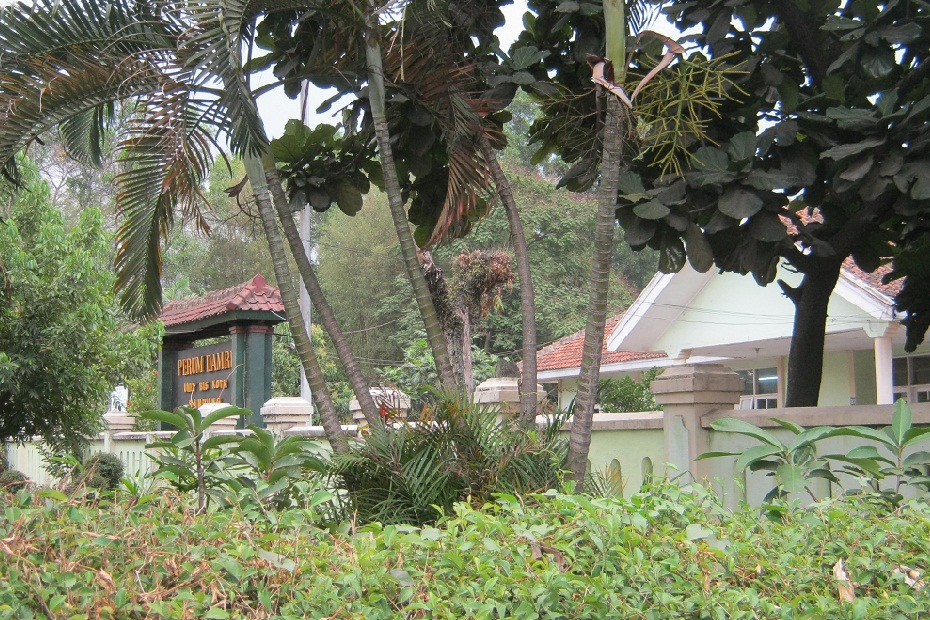 Bengkel DAMRI Gedebage